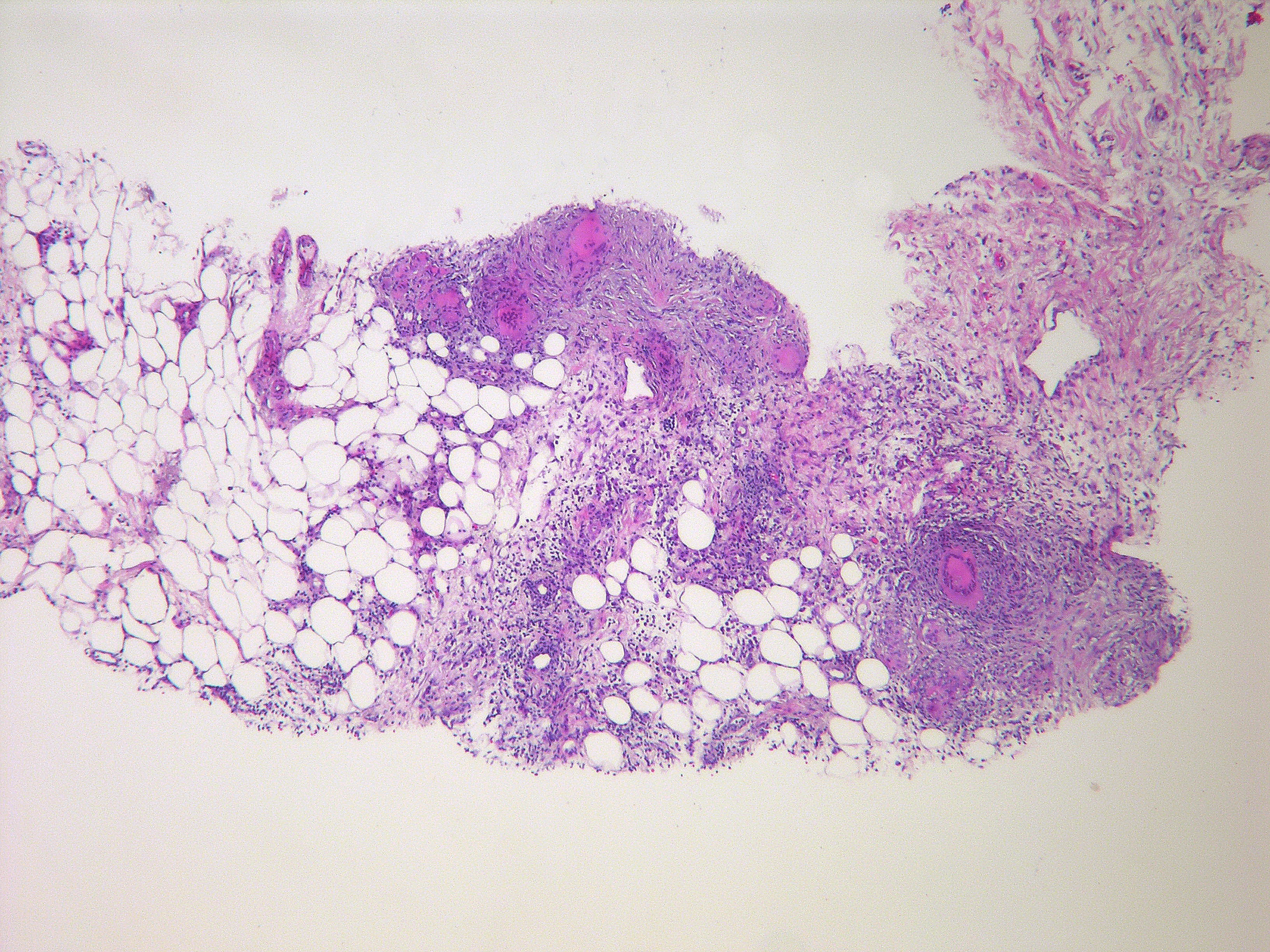 Tuberculous peritonitis